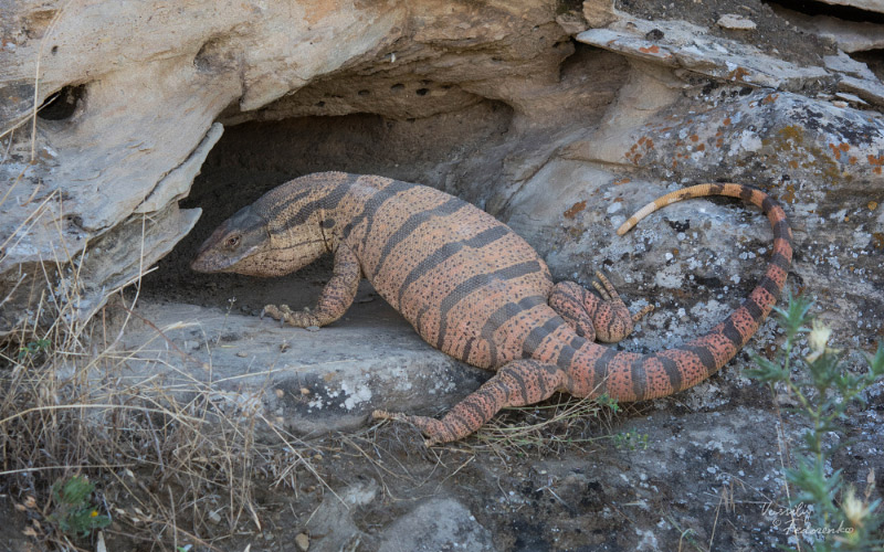 Взрослая особь среднеазиатского серого варана